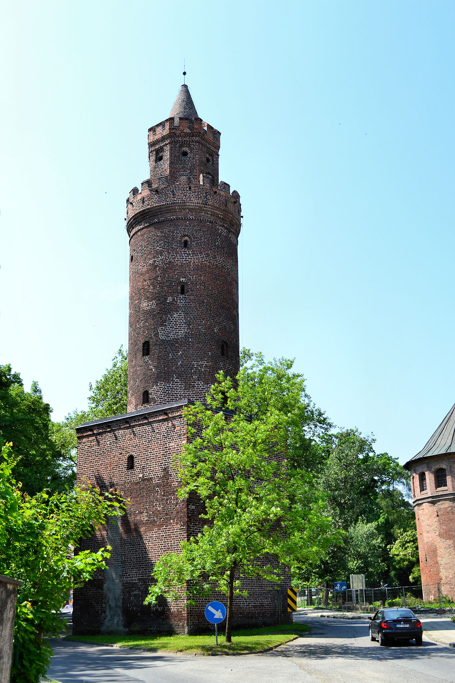 Baszta Tkaczy (Lodowa) w Stargardzie Szczecińskim